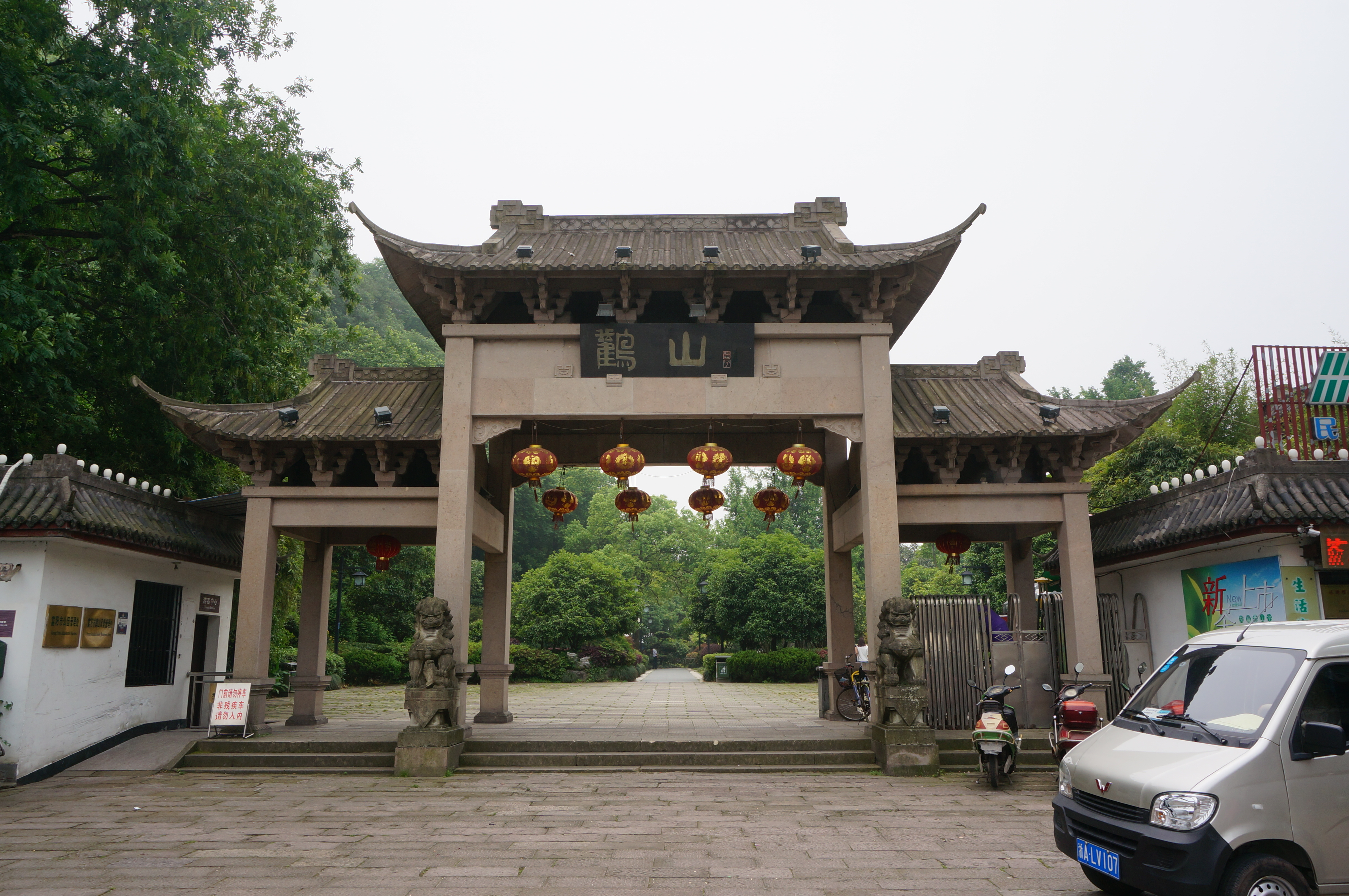 鹳山，景区大门外侧（北侧）。